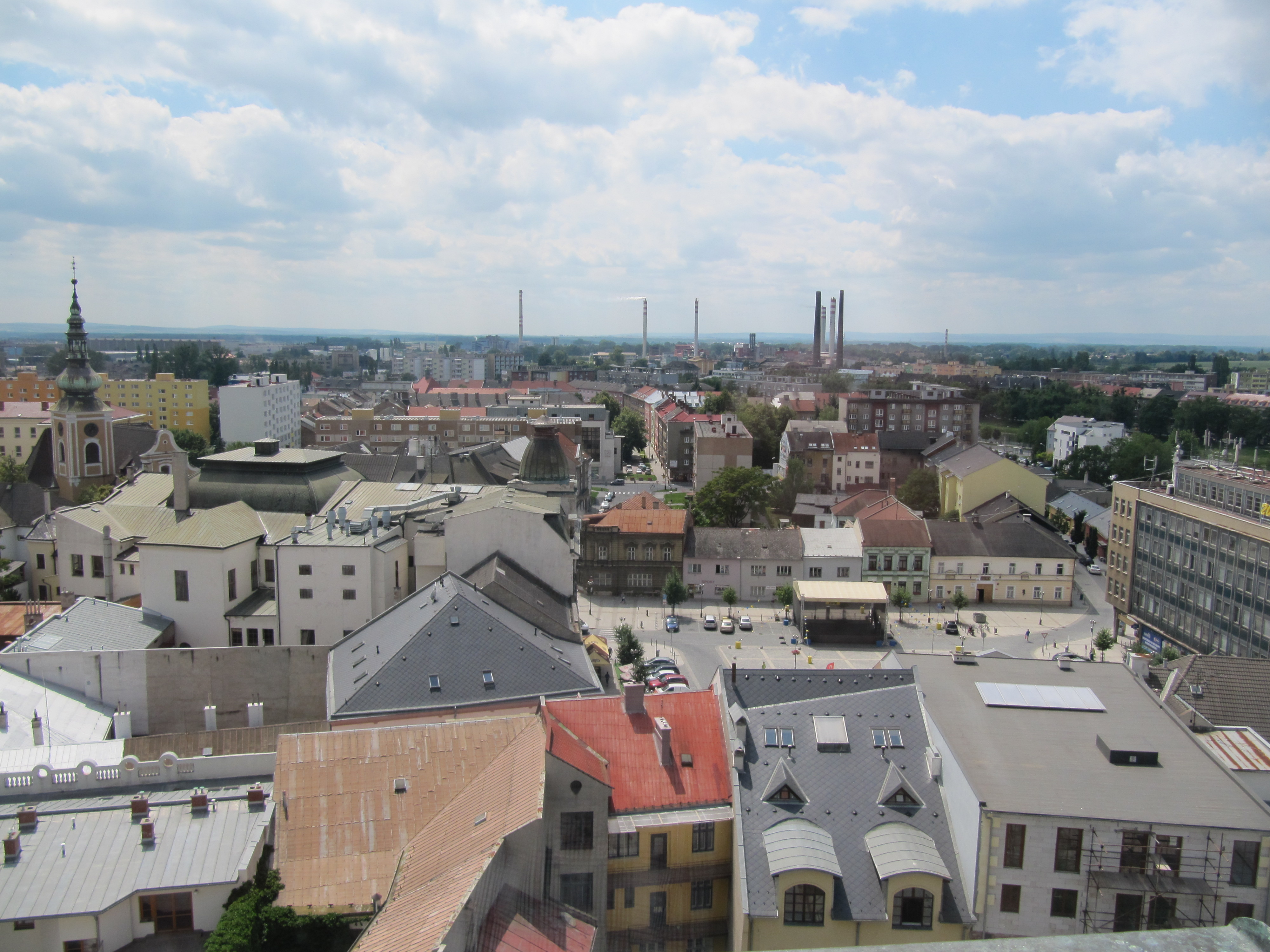 Přerov, pohled z věže zámku na západ